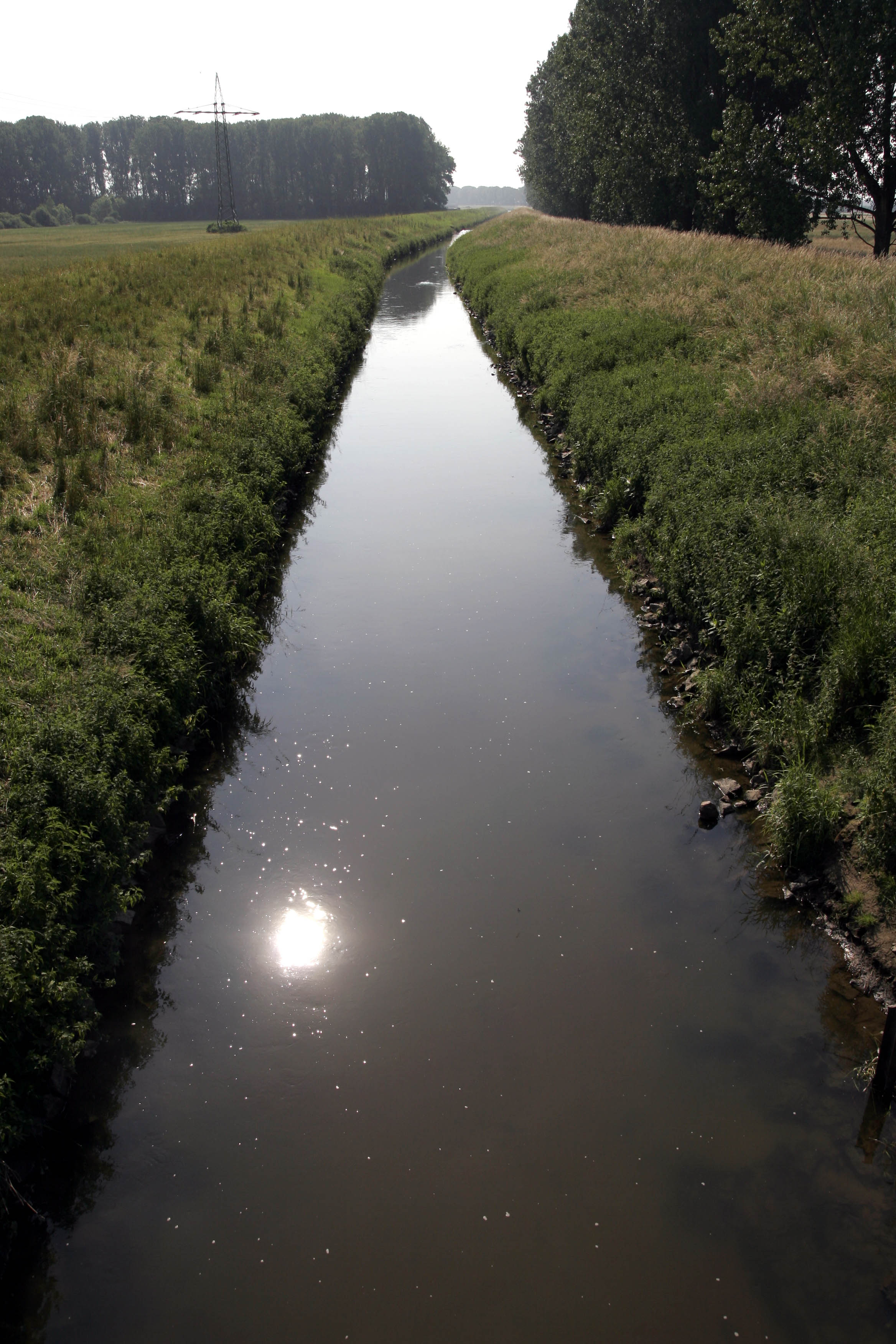 Die begradigte Weschnitz bei Biblis (Südhessen, Landkreis Bergstraße)